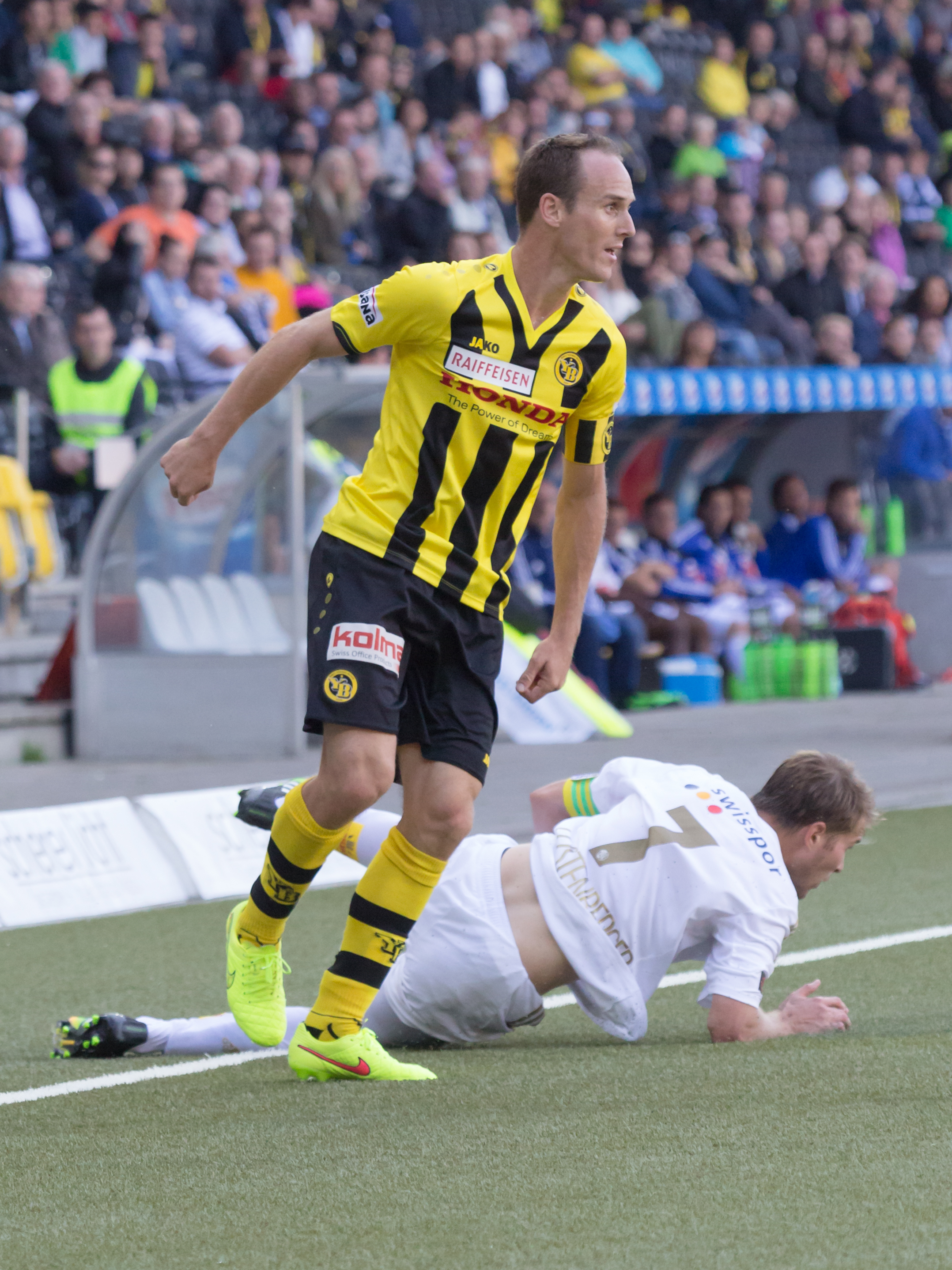 Steve von Bergen nach einem Zweikampf mit Claudio Lustenberger beim Spiel des BSC Young Boys gegen den FC Luzern